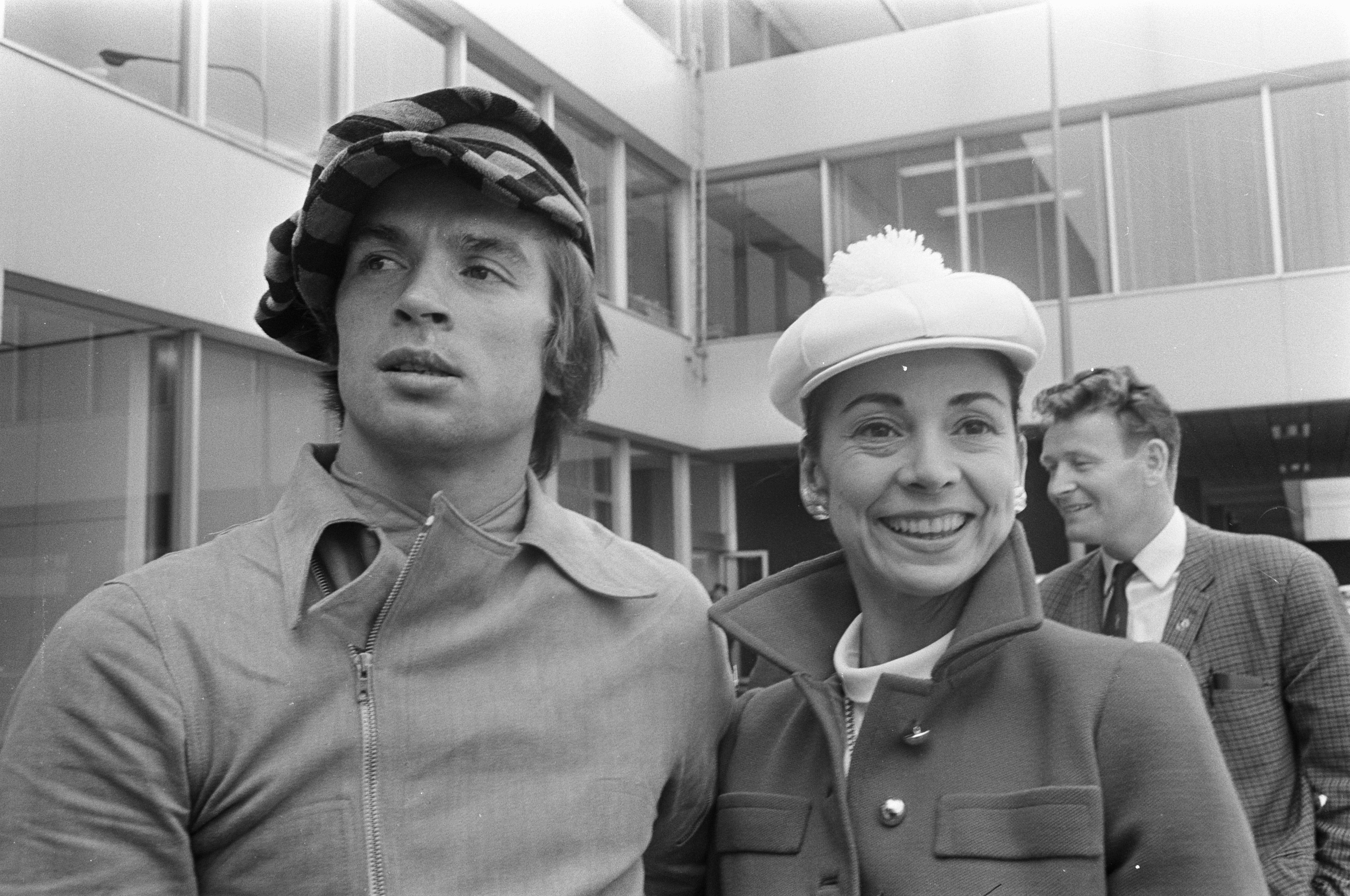 Collectie / Archief : Fotocollectie Anefo Reportage / Serie : [ onbekend ] Beschrijving : Aankomst Margot Fonteyn en Rudolf Nurejev op Schiphol Margot Fonteyn en Rudolf Nurejev Datum : 10 juli 1968 Locatie : Noord-Holland, Schiphol Trefwoorden : aankomsten Persoonsnaam : Rudolf Nurejev Fotograaf : Koch, Eric / Anefo Auteursrechthebbende : Nationaal Archief Materiaalsoort : Negatief (zwart/wit) Nummer archiefinventaris : bekijk toegang 2.24.01.05 Bestanddeelnummer : 921-5013